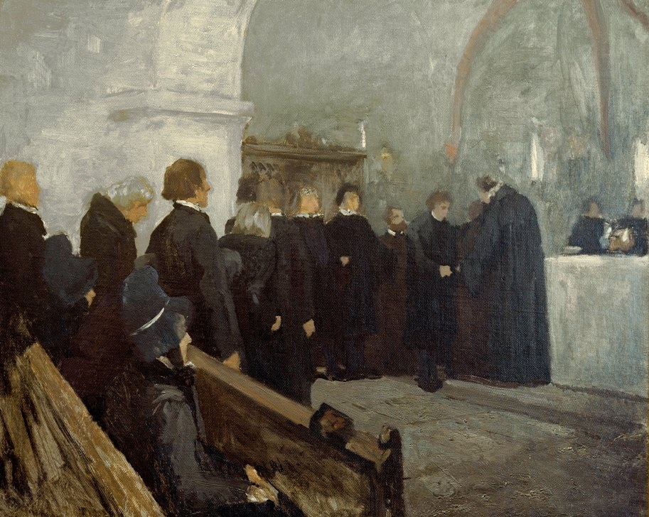 a study